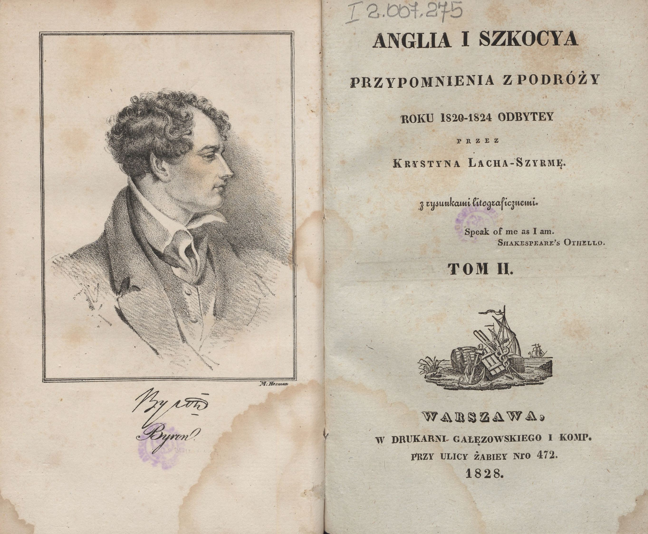 Strona tytułowa dzieła Krystyna Lacha-Szyrmy „Anglia i Szkocya : przypomnienia z podróży roku 1823-1824 odbytey” (tom 2), po lewej stronie widoczny portret Byrona – grafika Marii Herman